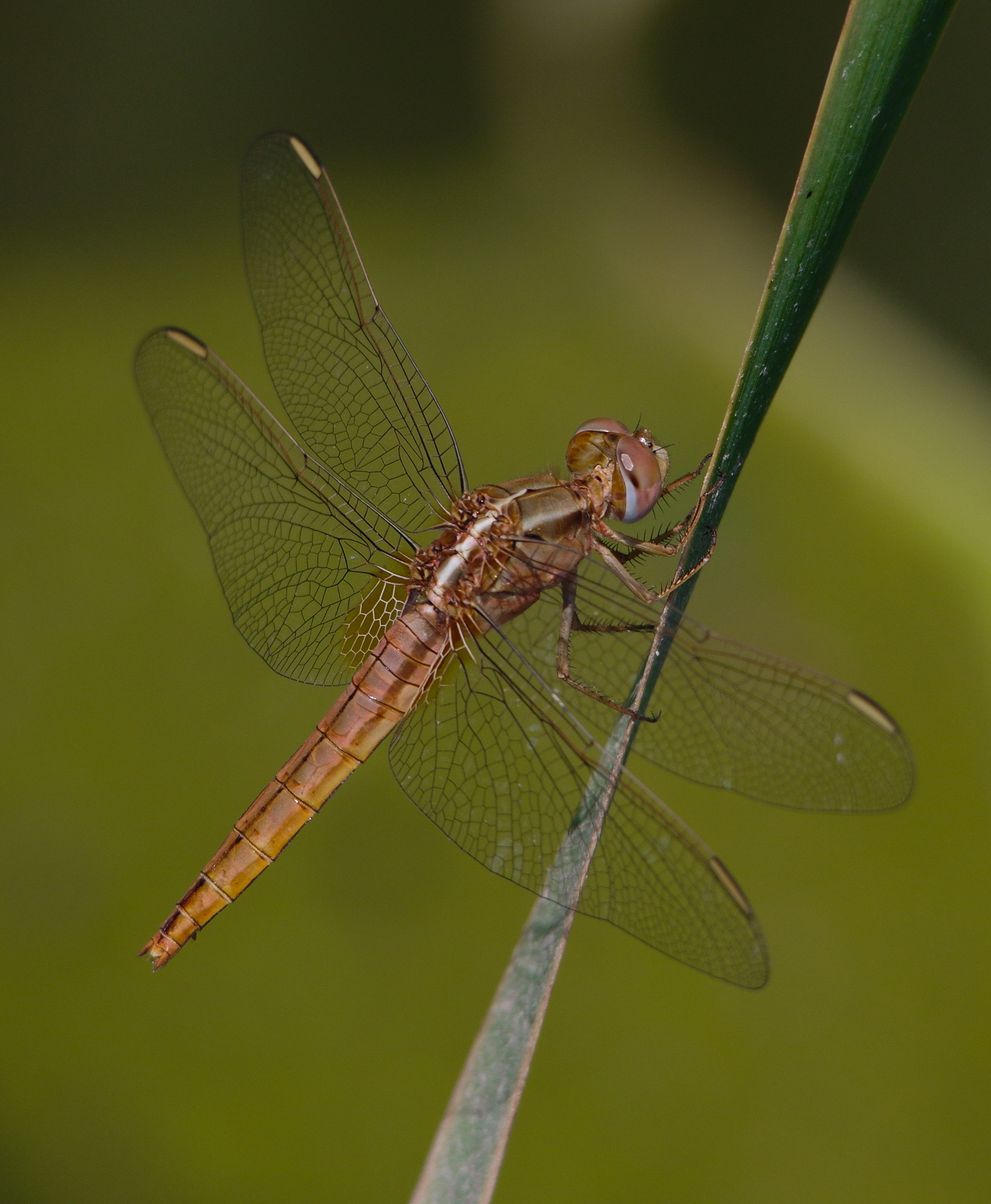 Libellule écarlate (Crocothemis erythraea) mâle (Ichkeul-site RAMSAR)